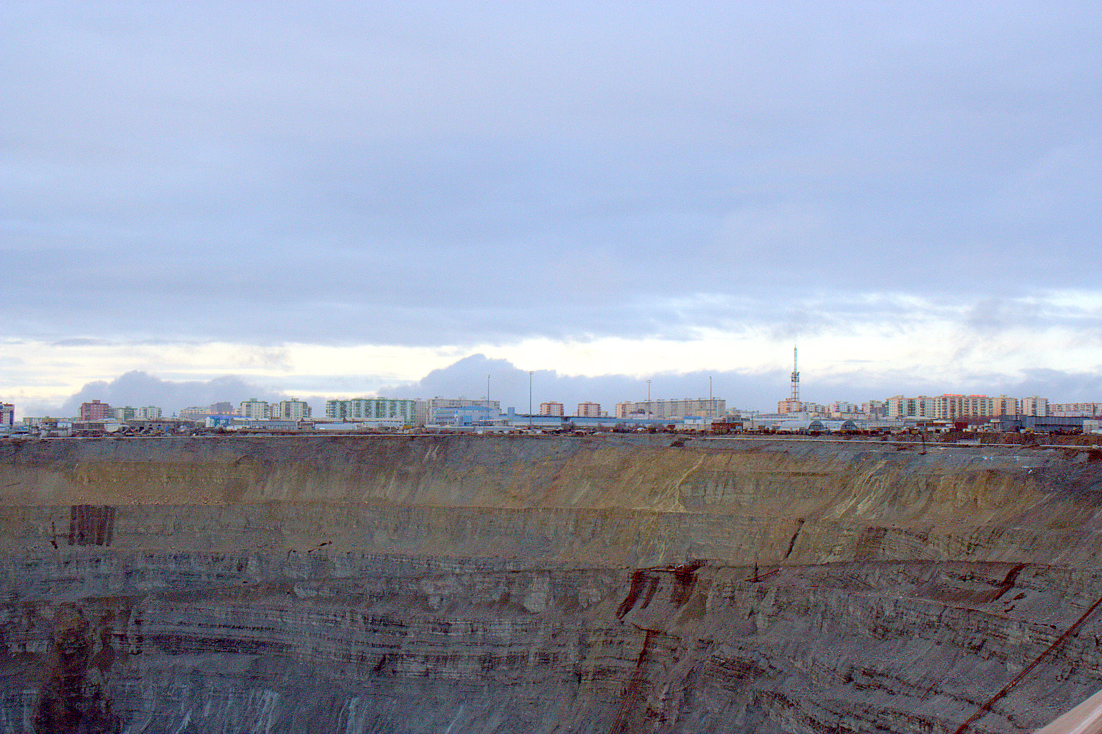 Das Stadt Mirny von der Grube aus gesehen.